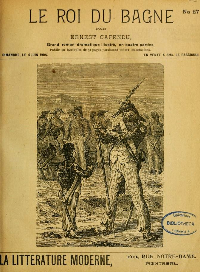 Ernest Capendu : page de cuverture de son roman "Le roi du bagne", publié en 1905